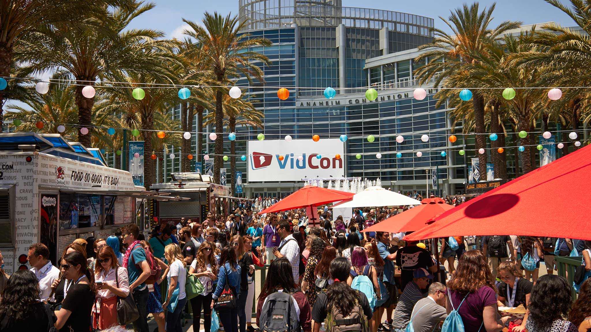 Najväčší YouTube festival VidCon.